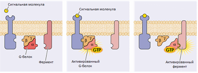 Схема действия G-связанного рецептора